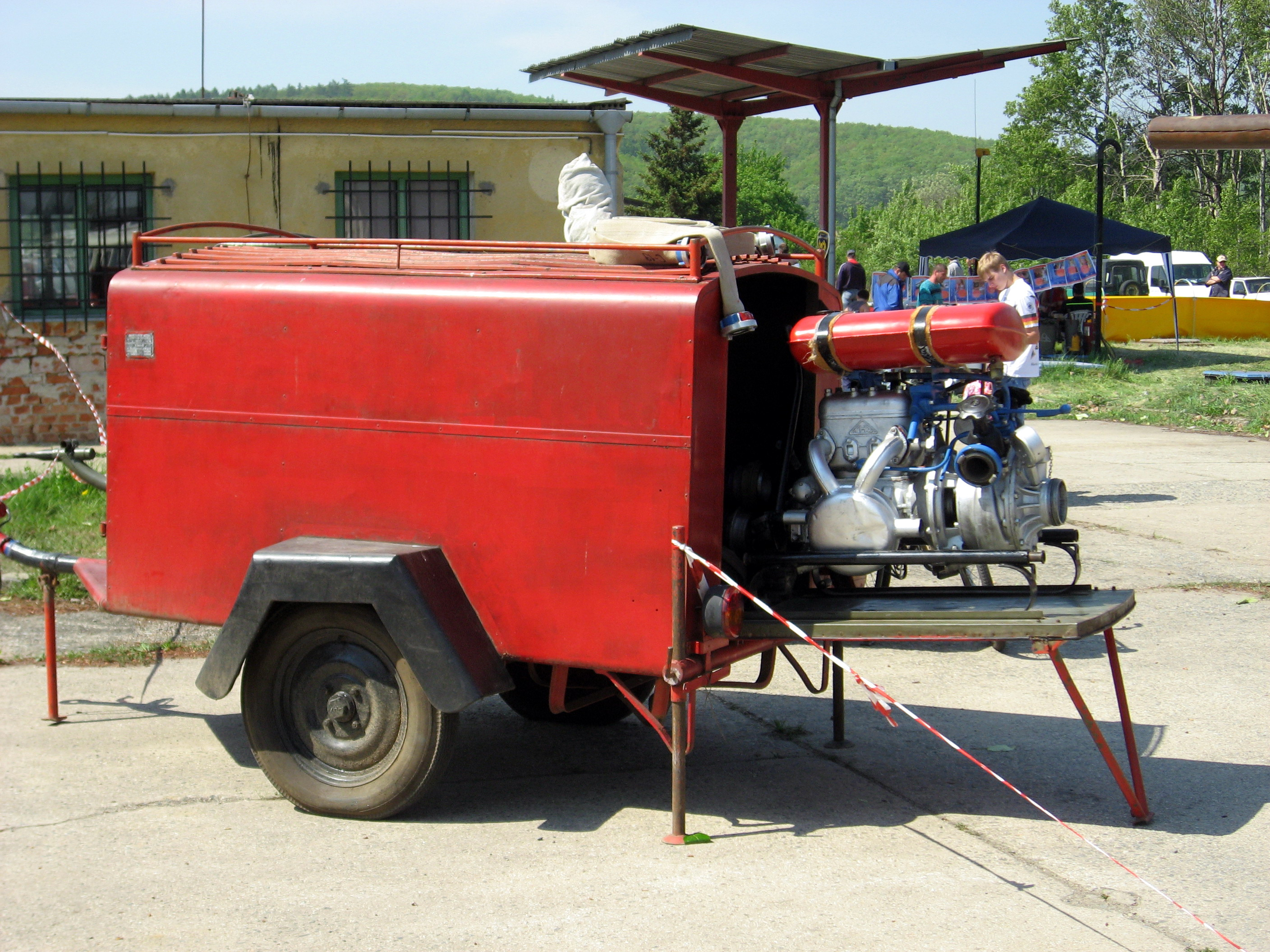 Den otevřených dveří v Řečkovicích, výstava hasičských vozů a techniky